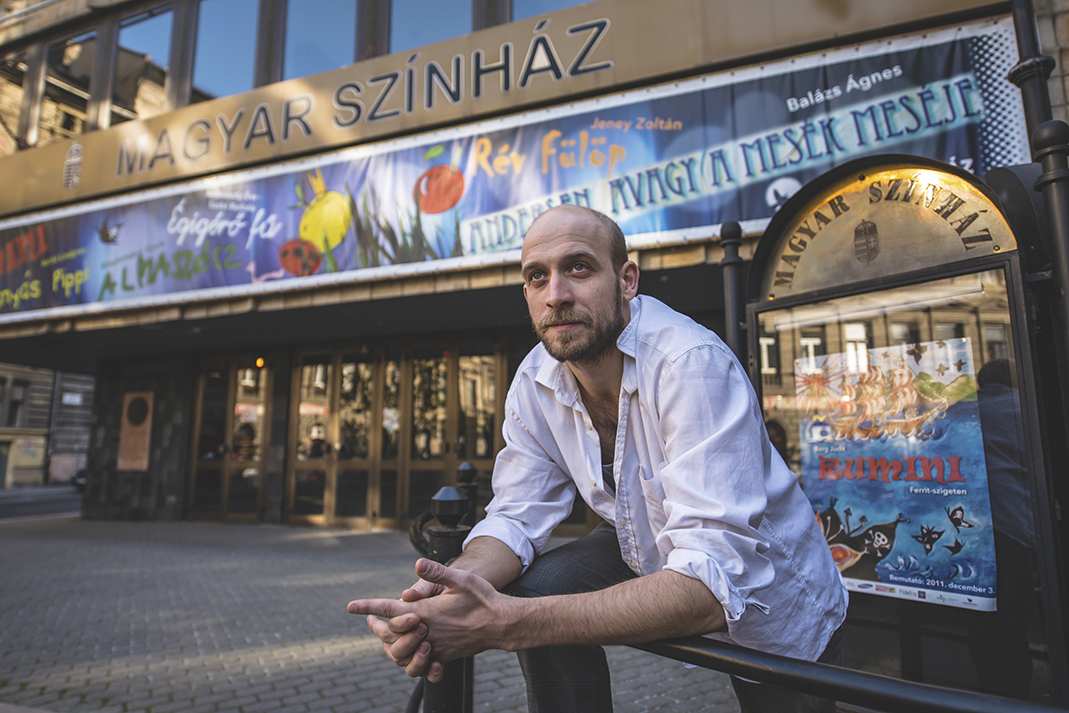 Takács Géza, Pesti Magyar Színház - Hevesi Sándor tér, 2015. (A fotó F. M. Dosztojevszkij: Ördögök c-ű előadása előtt készült, amiben Lebjadkin kapitány szerepét alakította.)